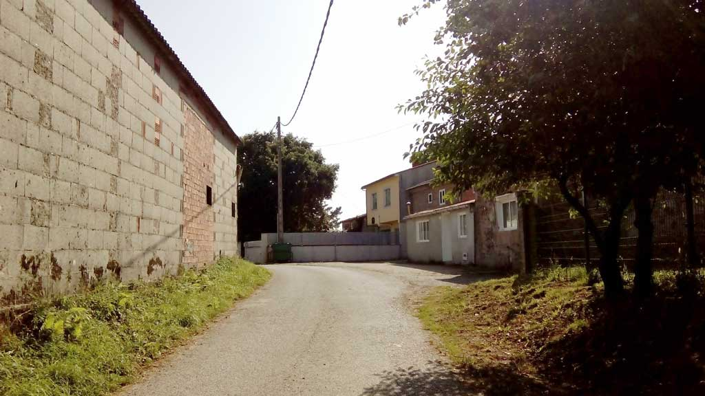 Vista da Lagoa, Curtis.